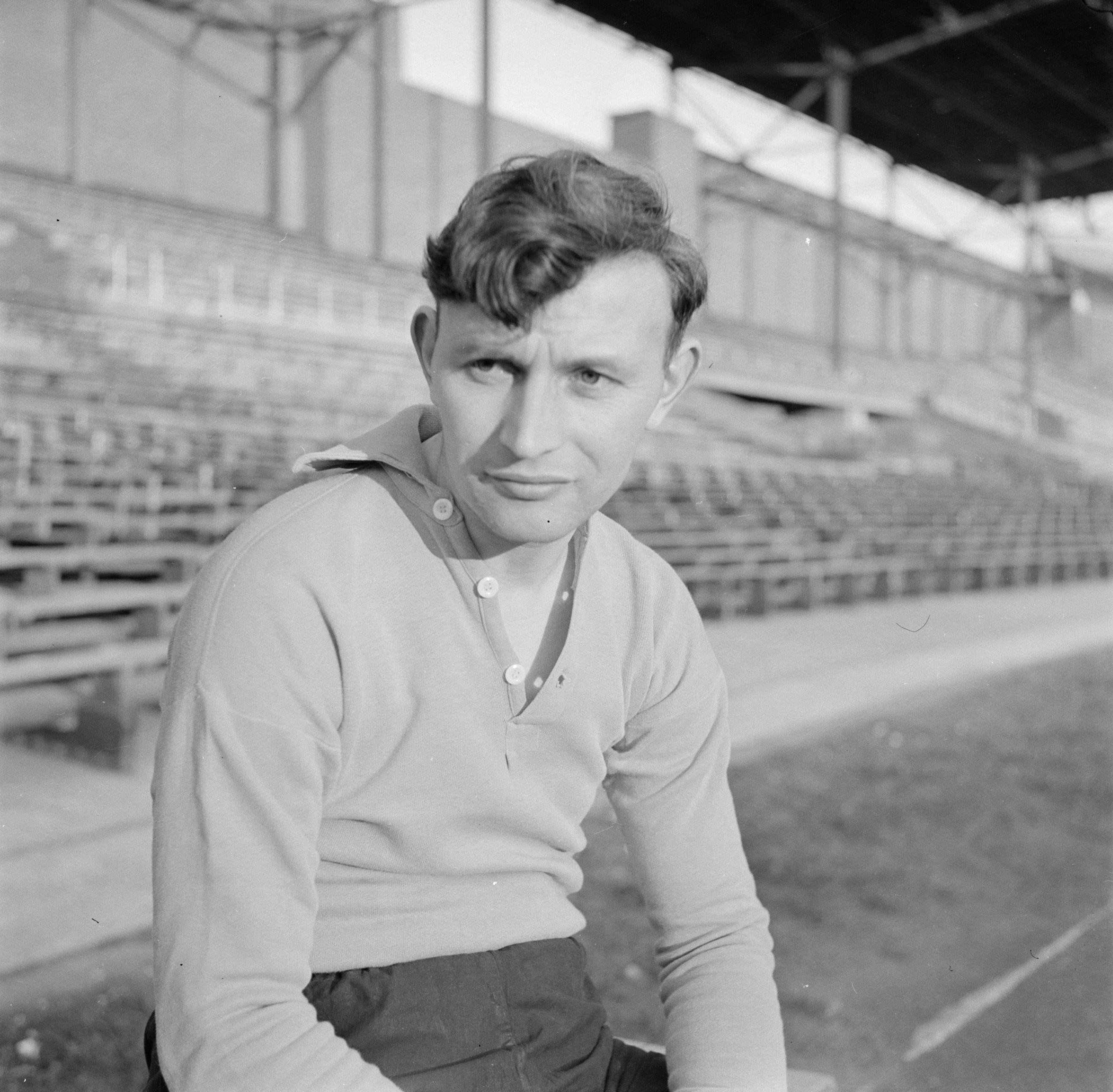 Collectie / Archief : Fotocollectie Van de Poll Reportage / Serie : Nederlands voetbalelftal 1951 Beschrijving : Abe Lenstra (Heerenveen) in het Olympisch Stadion in Amsterdam, enige dagen na de oefeninterland tegen België Datum : 24 april 1951 Locatie : Amsterdam, Noord-Holland Trefwoorden : portretten, stadions, voetballers Persoonsnaam : Lenstra, Abe Instellingsnaam : Olympisch Stadion Fotograaf : Poll, Willem van de Auteursrechthebbende : Nationaal Archief Materiaalsoort : Glasnegatief Nummer archiefinventaris : bekijk toegang 2.24.14.02 Bestanddeelnummer : 191-1062